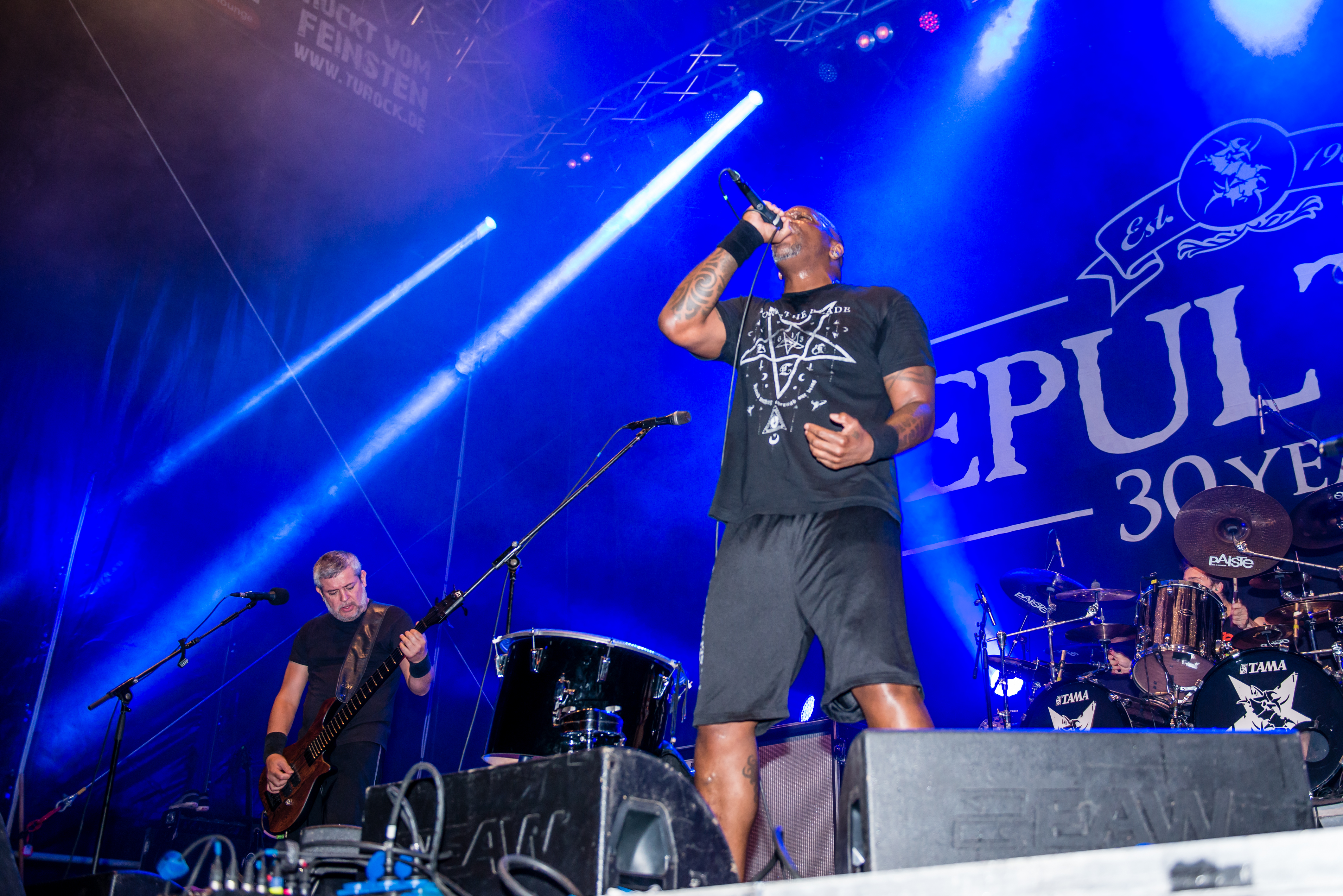 'Turock Open Air 2015; Essen': 'Sepultura'